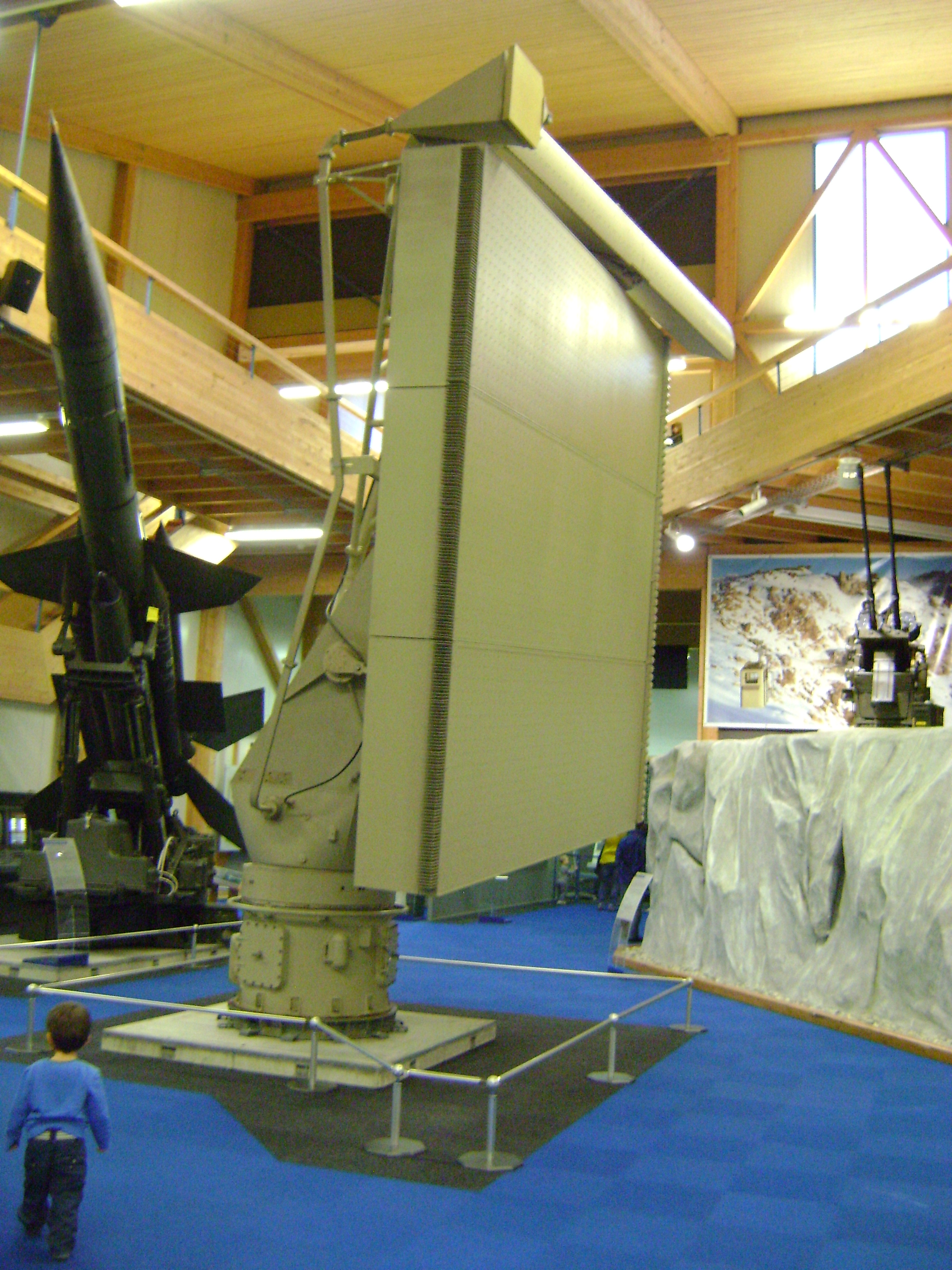 Radar des Florida Luftraumüberwachungssystem der Schweizer Luftwaffe im Einsatz 1965-2005. Im Fliegermuseum dübendorf.Im Hintergrund eine BL-64 Bloodhound Luftabwehrrakete